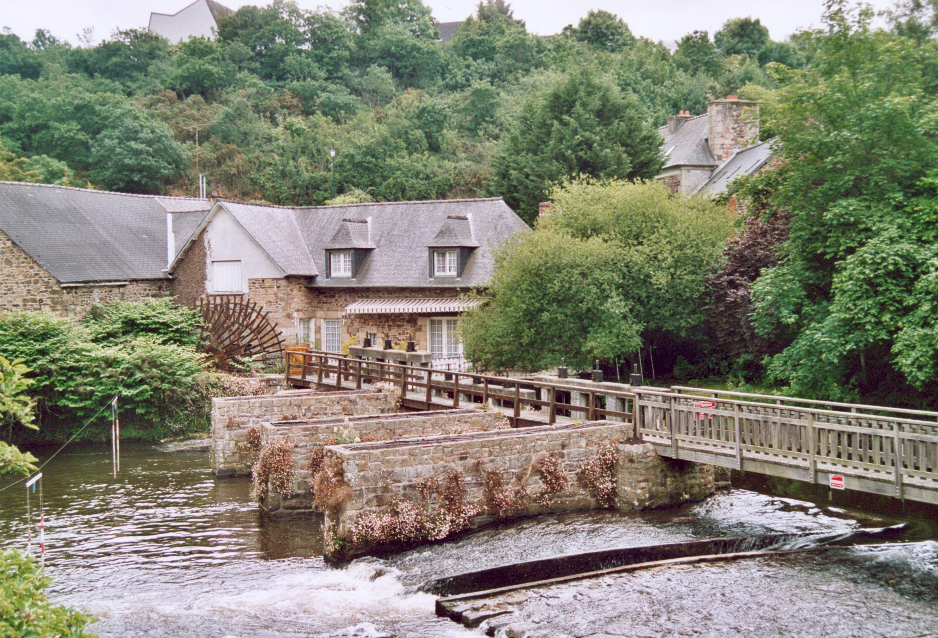 France Bretagne Côtes d'Armor Moulin du Richel à Pontrieux Photographie prise par GIRAUD Patrick